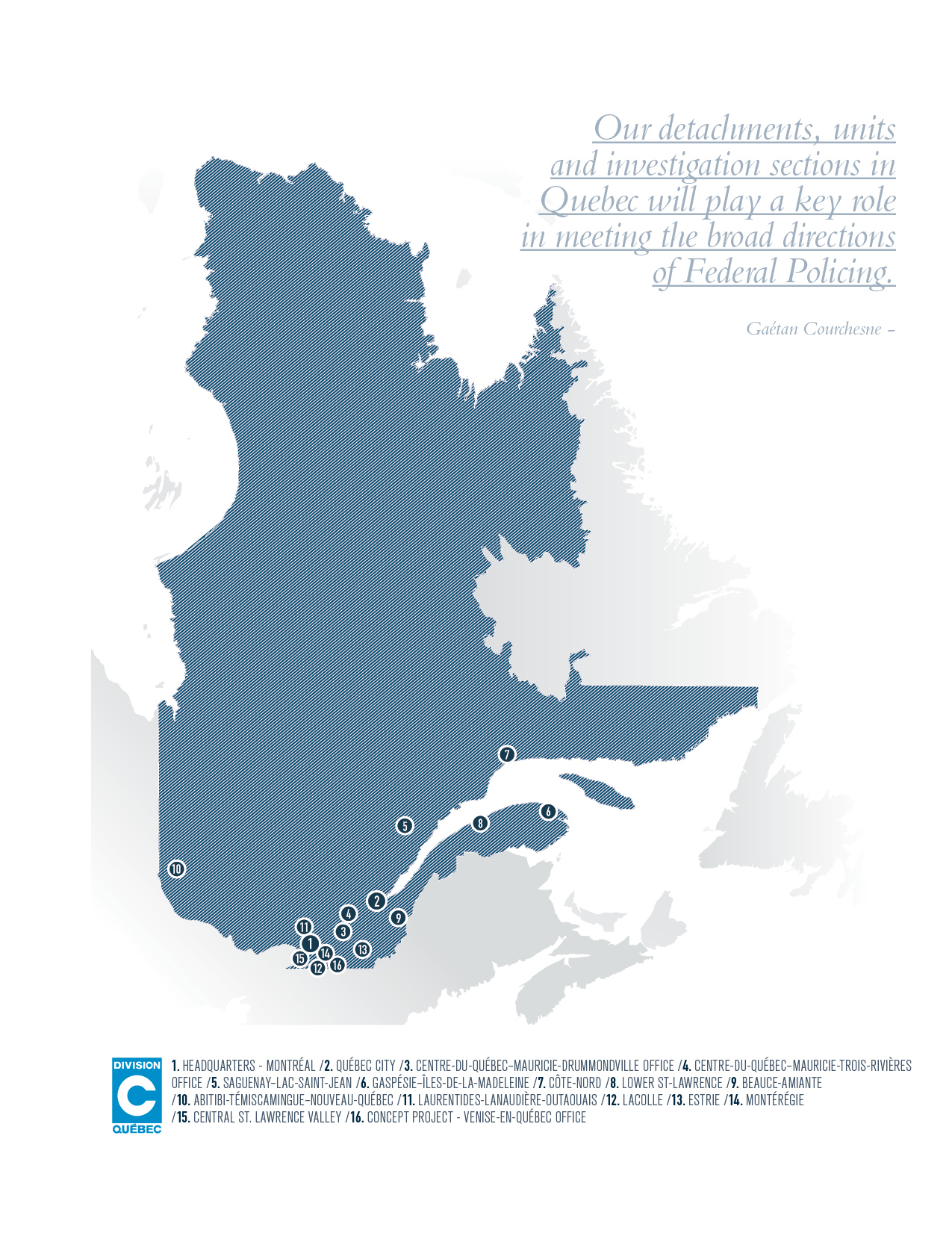 carte des détachements Division C